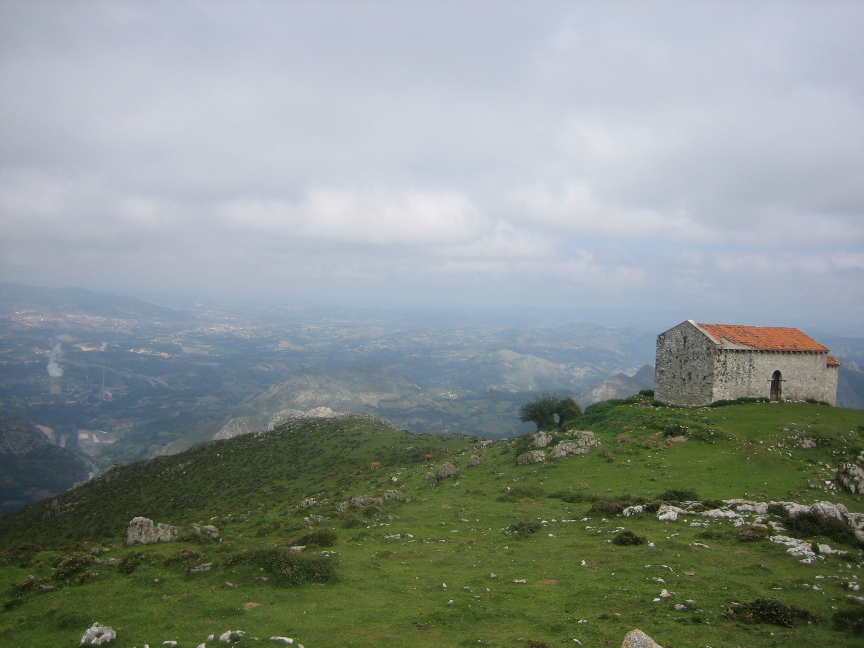 Capilla Medieval del Monsacro, Morcín, Asturias.